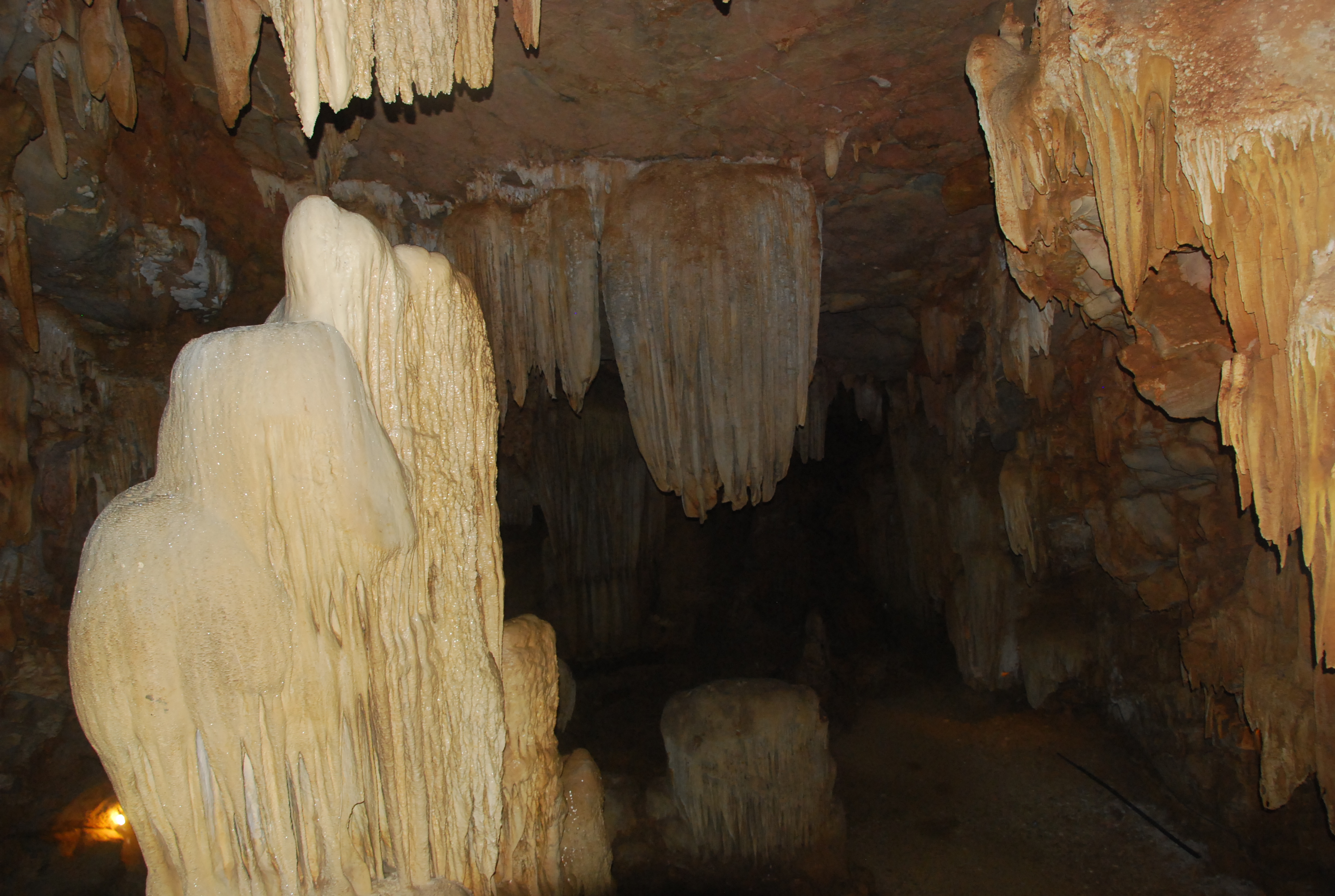 Động Vái Giời thuộc Thung Nham trong Quần thể di sản thế giới Tràng An